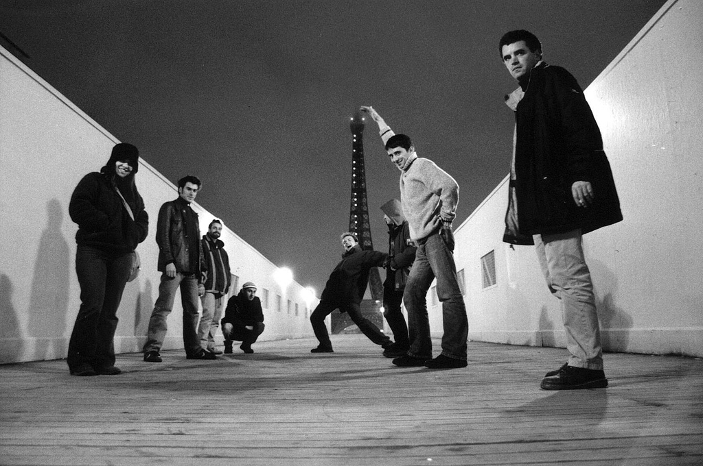 Emsaverien à Paris après le fest-noz de Courbevoie